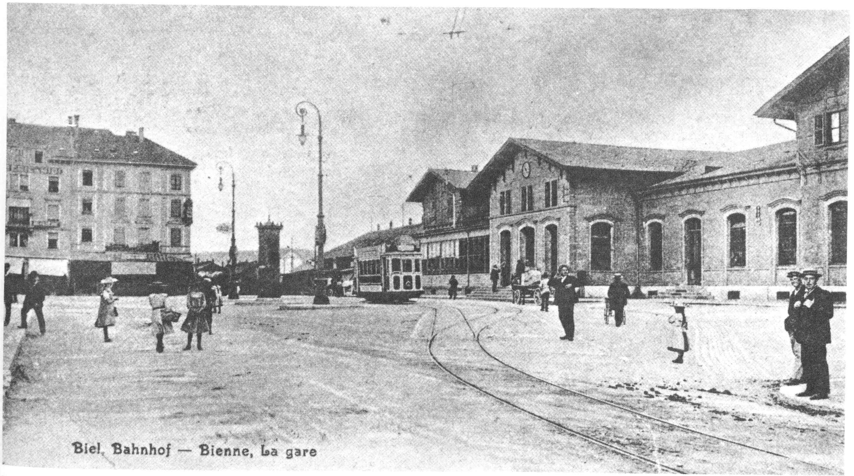 Bahnhof Biel von 1864 Das Jahr kann nicht stimmen, 1864 gab es noch keine Fahrleitung, die erste elektrische Lokomotive fuhr erst 1879.